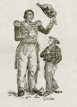 Altzoko erraldoia